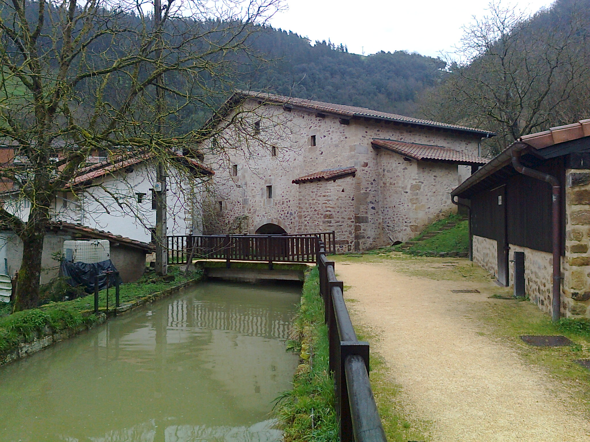 Ataungo San Gregorioko Larruntza errota